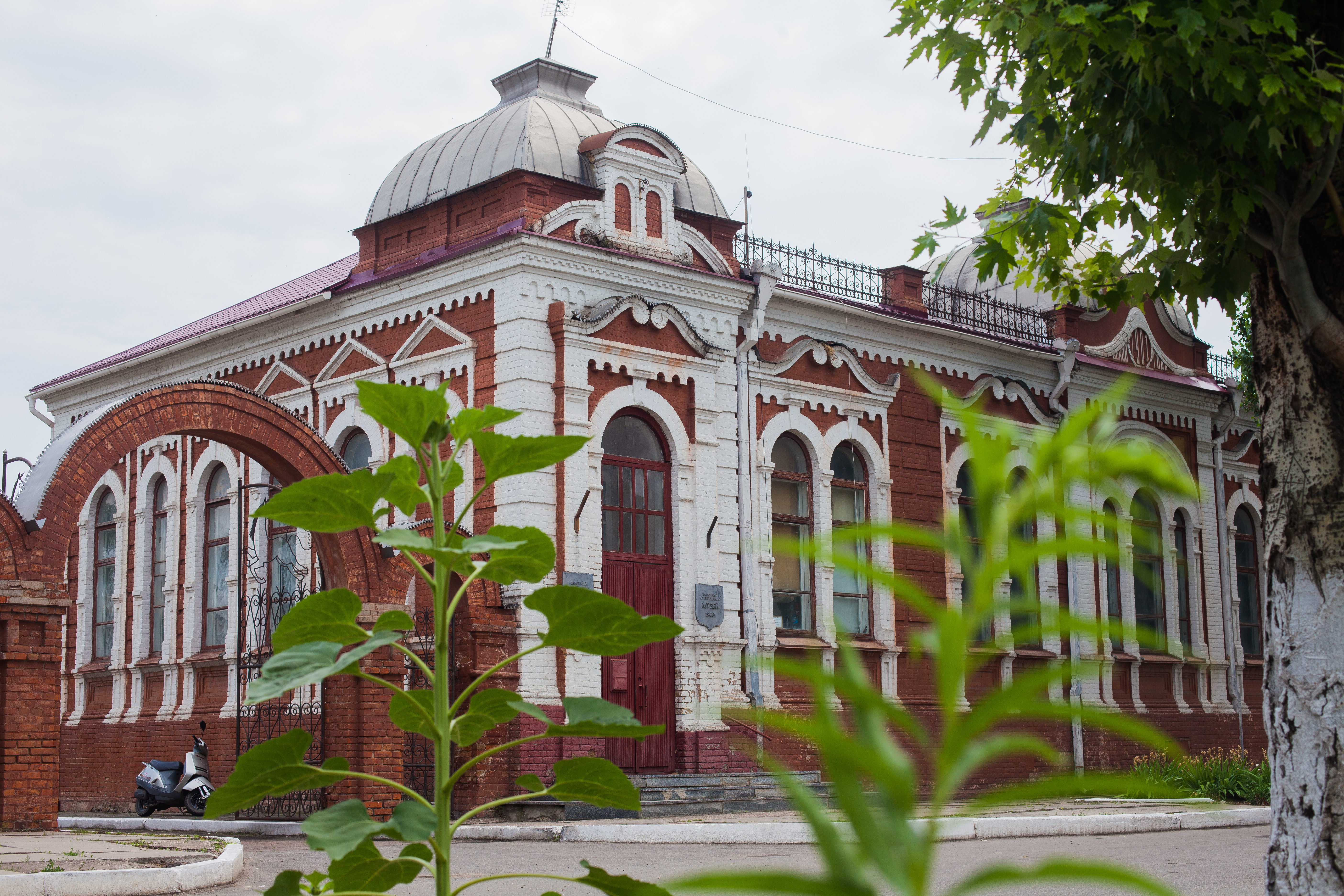 Гуляйпільський краєзнавчий музей розташований в будівлі 1901 року. Графік роботи: Понеділок-четвер з 8.00 по 17.00. П'ятниця з 8.00 до 16.00 Обідня перерва: 12.00-13.00 Субота: з 9.00 до 14.00 (за домовленістю) Вихідний - неділя Адреса: вул. Соборна, 75